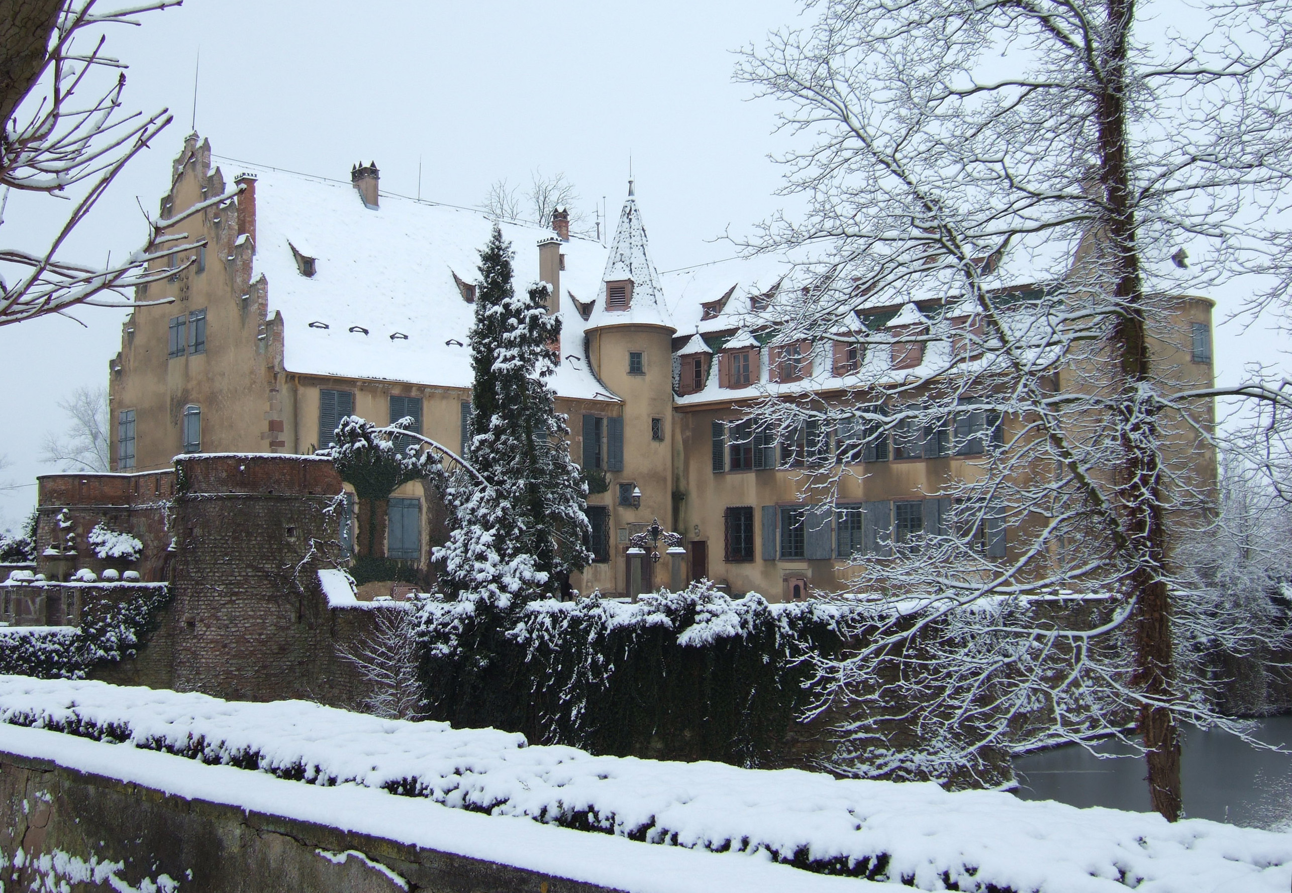 Château à douves datant du XVIème siècle